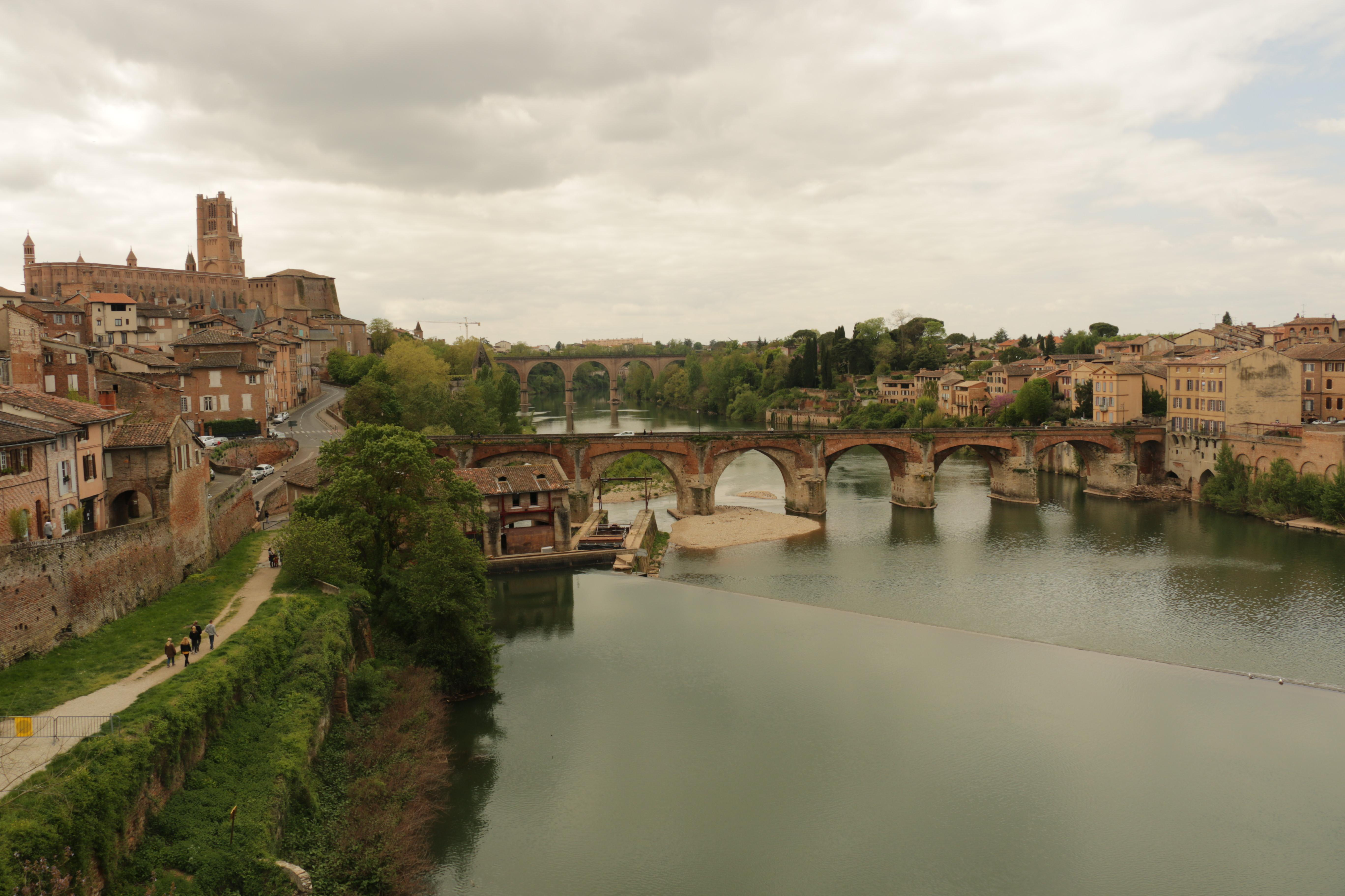 Der Tarn bei Albi und der Pont Vieux.